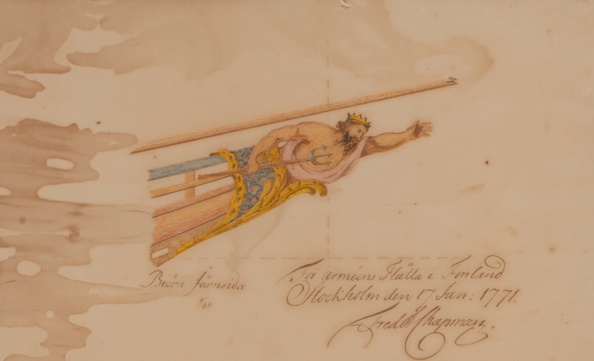 Ritning av galjon till fartyget Björn Järnsida i Arméns flotta. Målning från 1771.